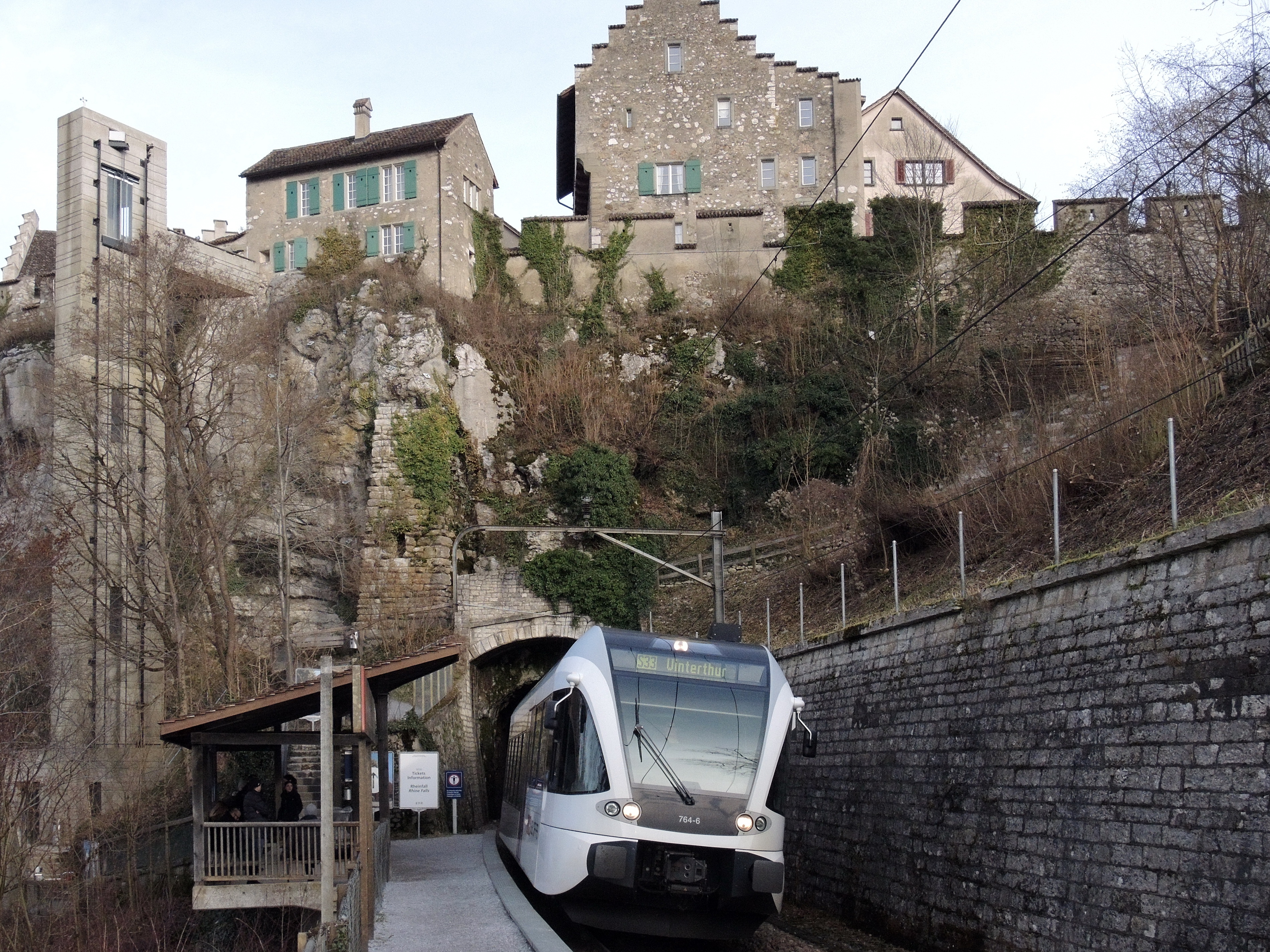 Schloss Laufen in Laufen-Uhwiesen (Switzerland)